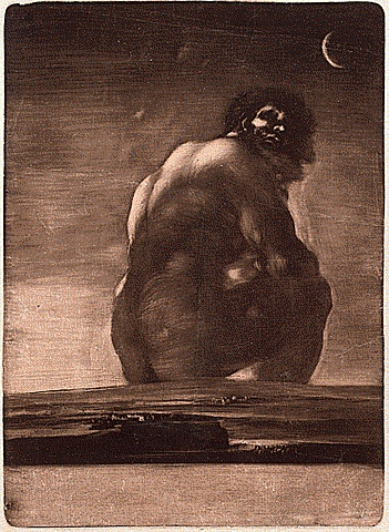 El coloso (prueba de estampa suelta). Aguatinta bruñida; 285 x 210 mm. Prueba de estado. 2º estado. Harris, 29.I.2. Invent/45622 (English:The Colossus. Etching with aquatint, 2nd state)